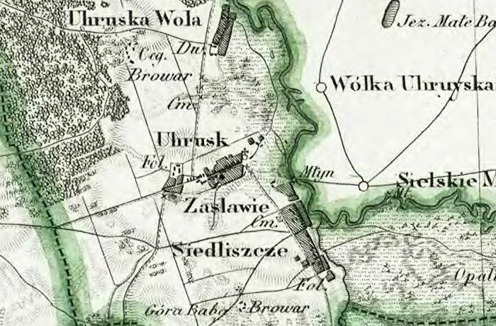 Uhrusk na mapie topograficznej Królestwa Polskiego z 1839 roku